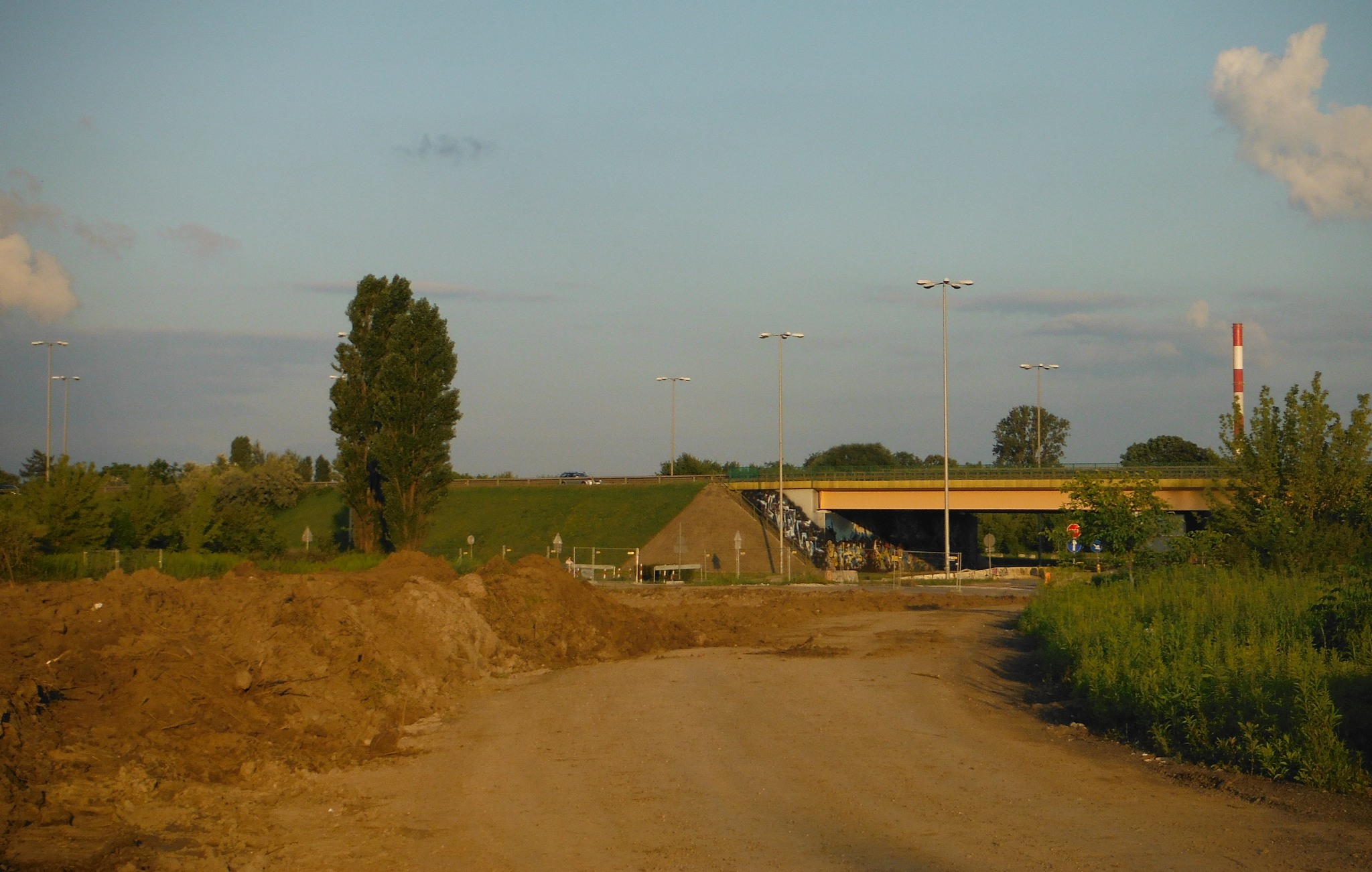 Budowa Alei Polski Walczącej (tzw. "Czerniakowska-bis") w Warszawie.